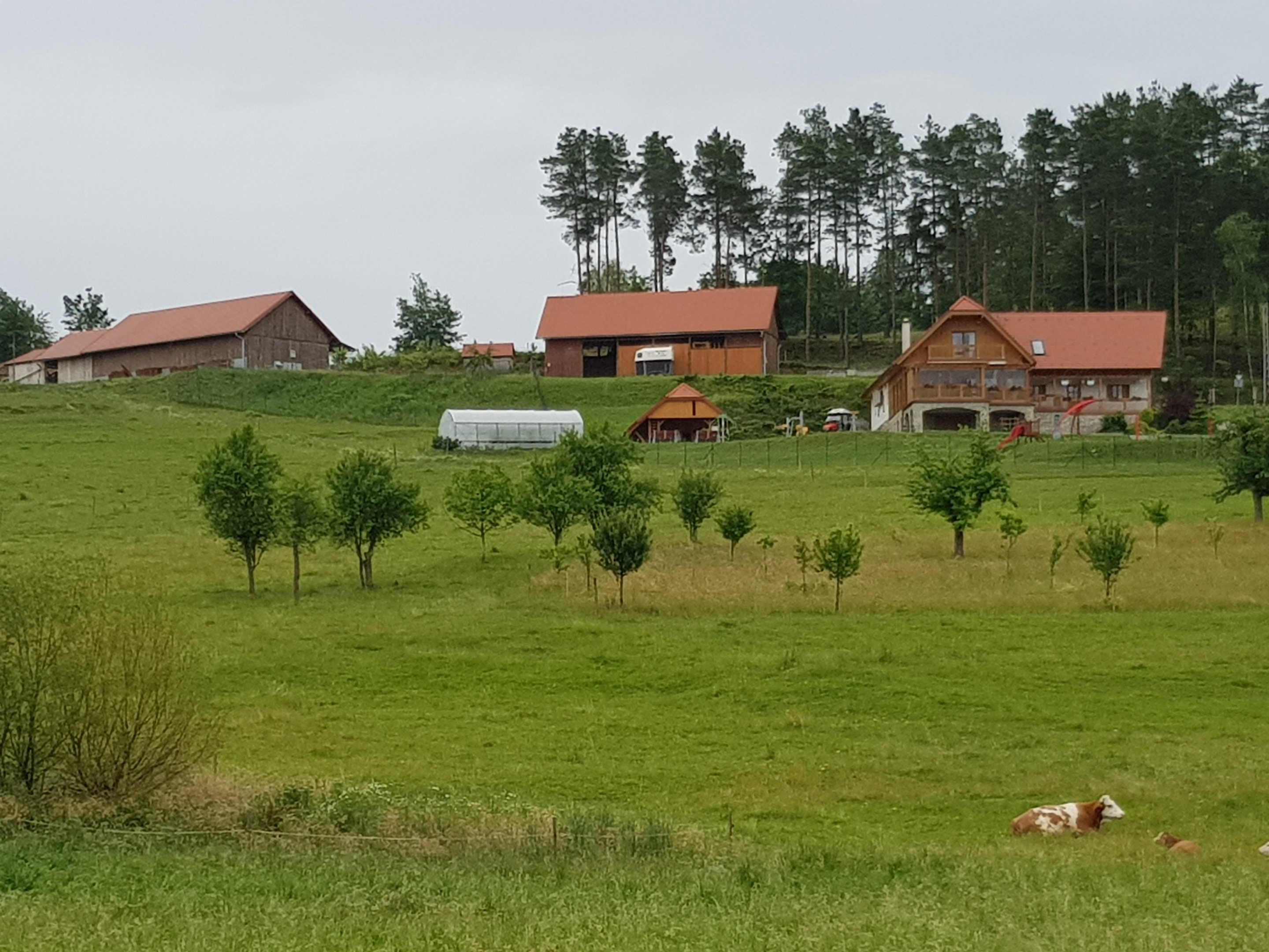 Slovenska vzorčna kmetija Gornji Senik